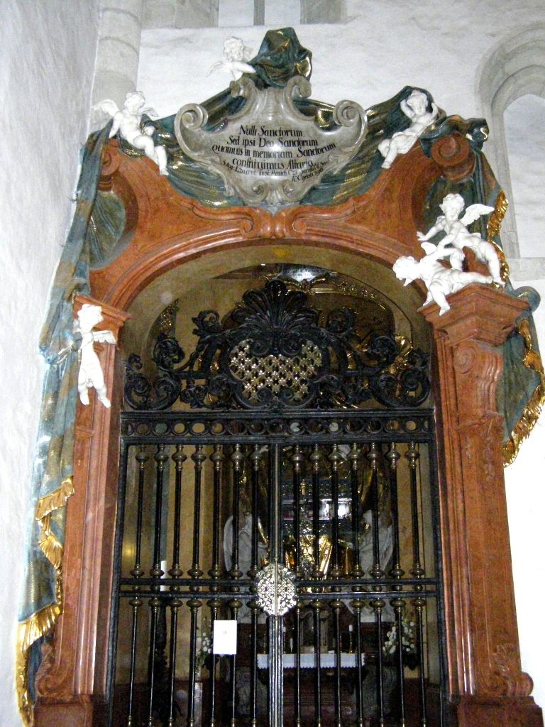 Impozantný vstup do kaplnky svätého Jána Almužníka